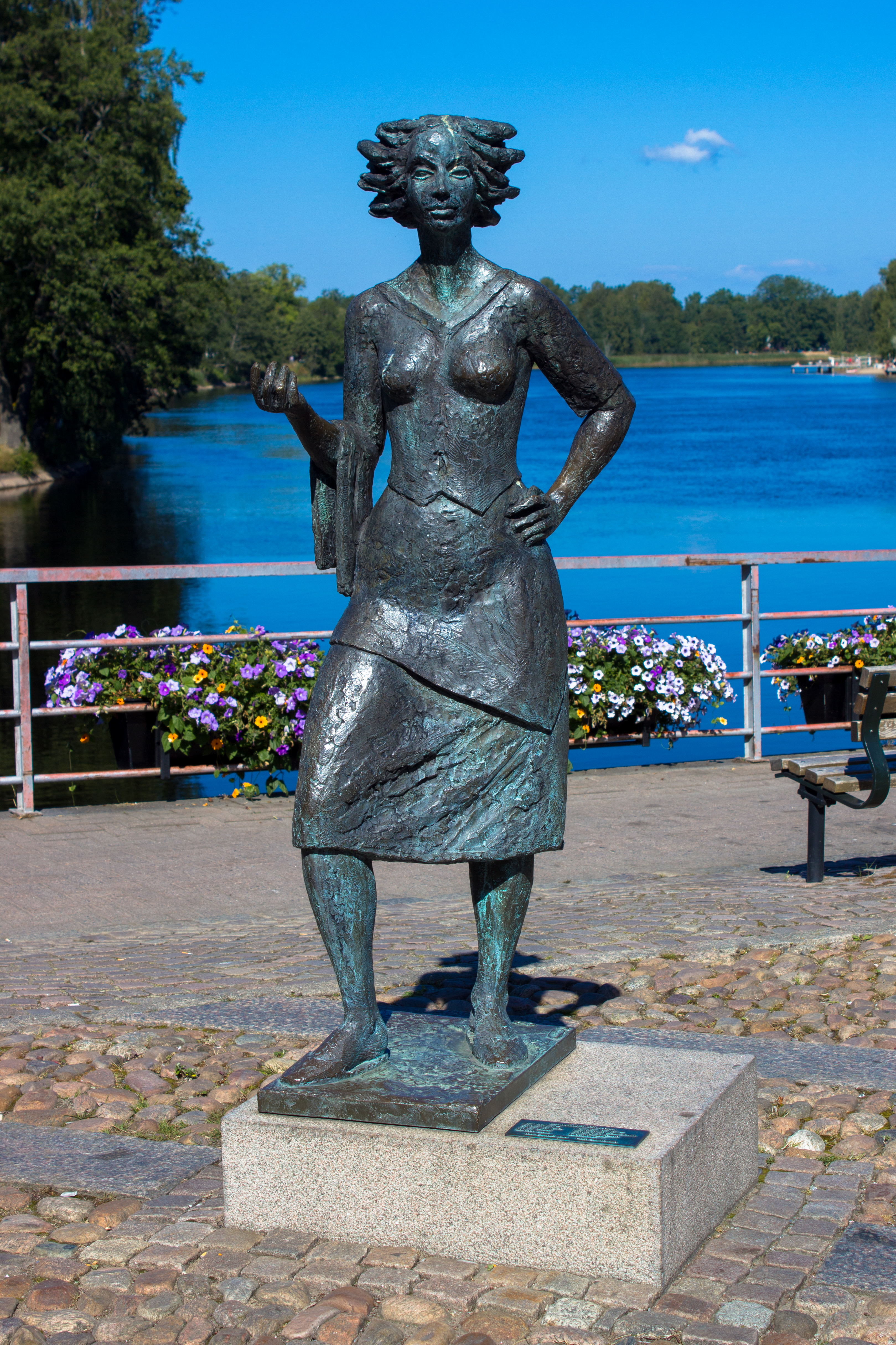 Estatua de Eva Lisa Holtz, alcumada "Sola i Karlstad" (o Sol en Karlstad), camareira de varias pousadas da cidade que se convertíu nun símbolo da mesma pola súa amabilidade.